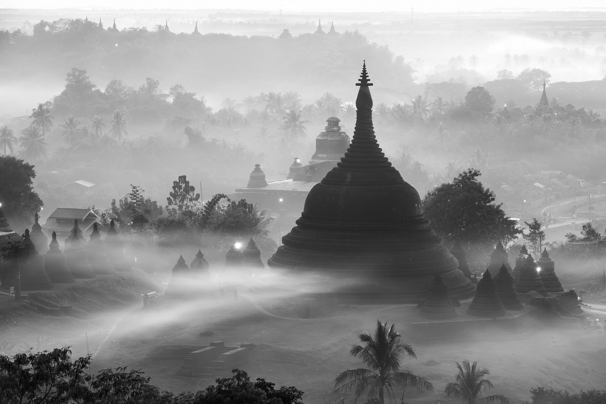 မြန်မာဘာသာ: ၂၀၁၈ ခုနှစ်၊ ဒီဇင်ဘာလကရိုက်ကူးခဲ့သော ထုက္ကသိမ်ဘုရား၊ မြောက်ဦးမြို့ပုံ